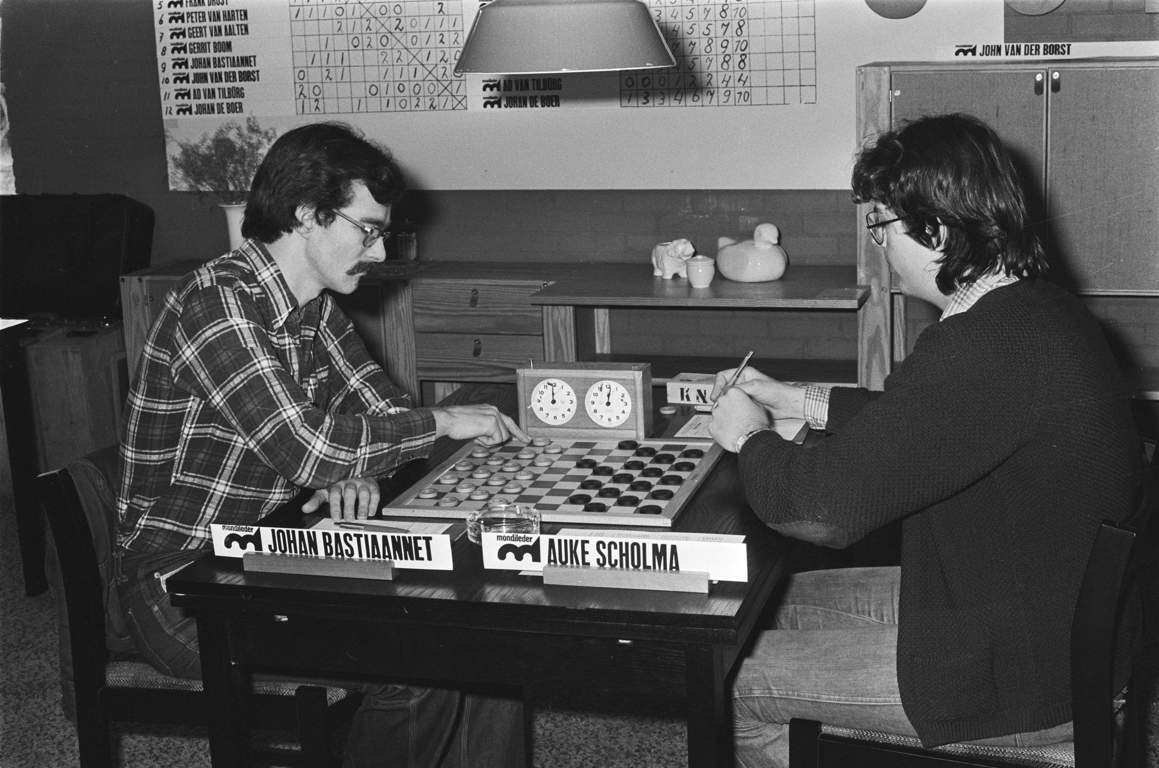 Nederlandse kampioenschappen dammen te Zevenaar; nr. 5 Van Aalten , nr. 7, 8 ?